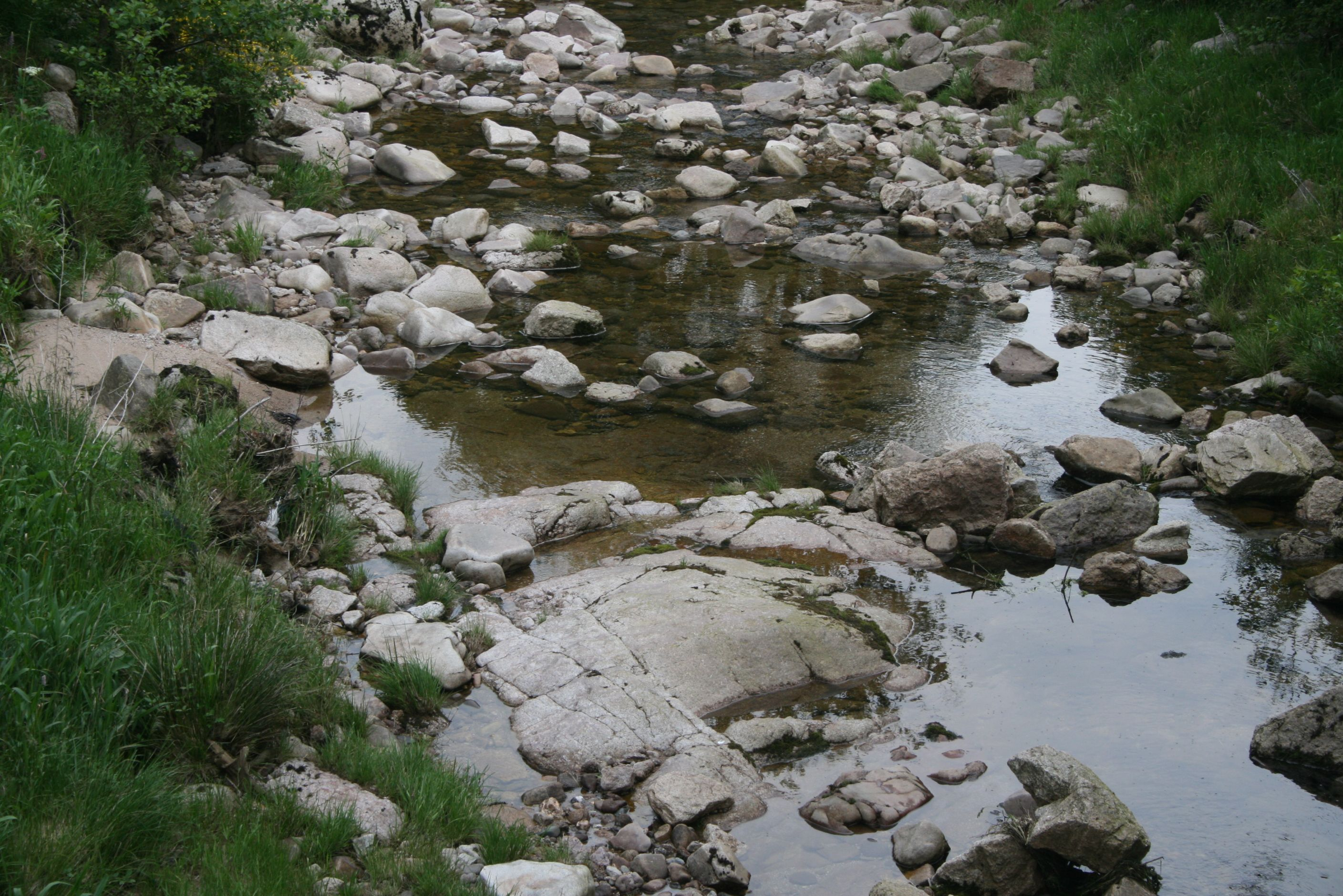 Die Zwickauer Mulde in der Nähe des Forsthauses an der Mulde. Der niedrige Wasserstand rührt auch daher, daß oberhalb dieser Stelle für den Betrieb von Wasserkraftwerken zur Erzeugung elektrischer Energie sehr viel Wasser aus der Mulde abgeleitet wird. Dies macht den aquatischen Lebewesen in Sommern mit so geringen Restwassermengen das Überleben schwer.